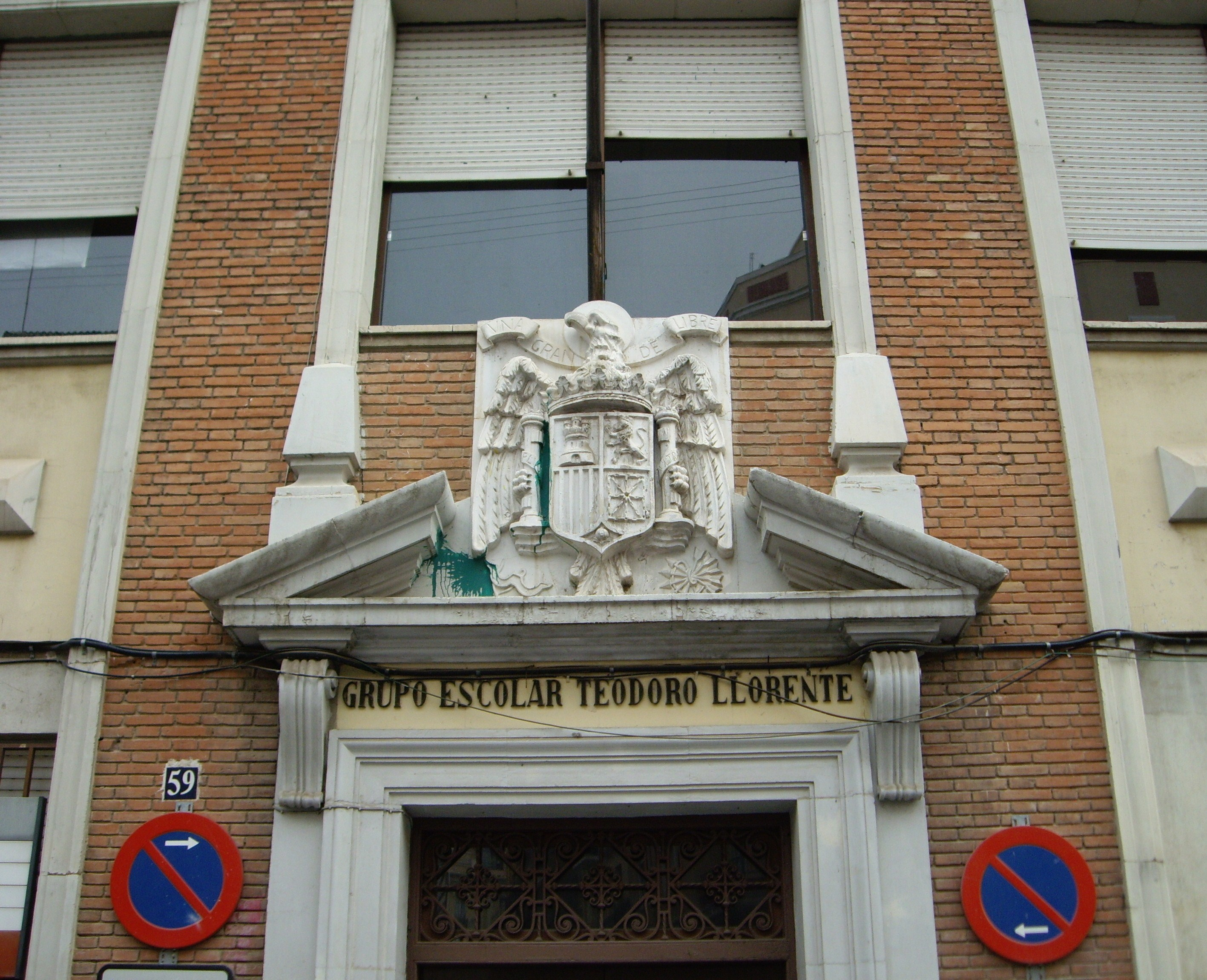 Escut franquista al grup escolar Teodor Llorente de València (2007)